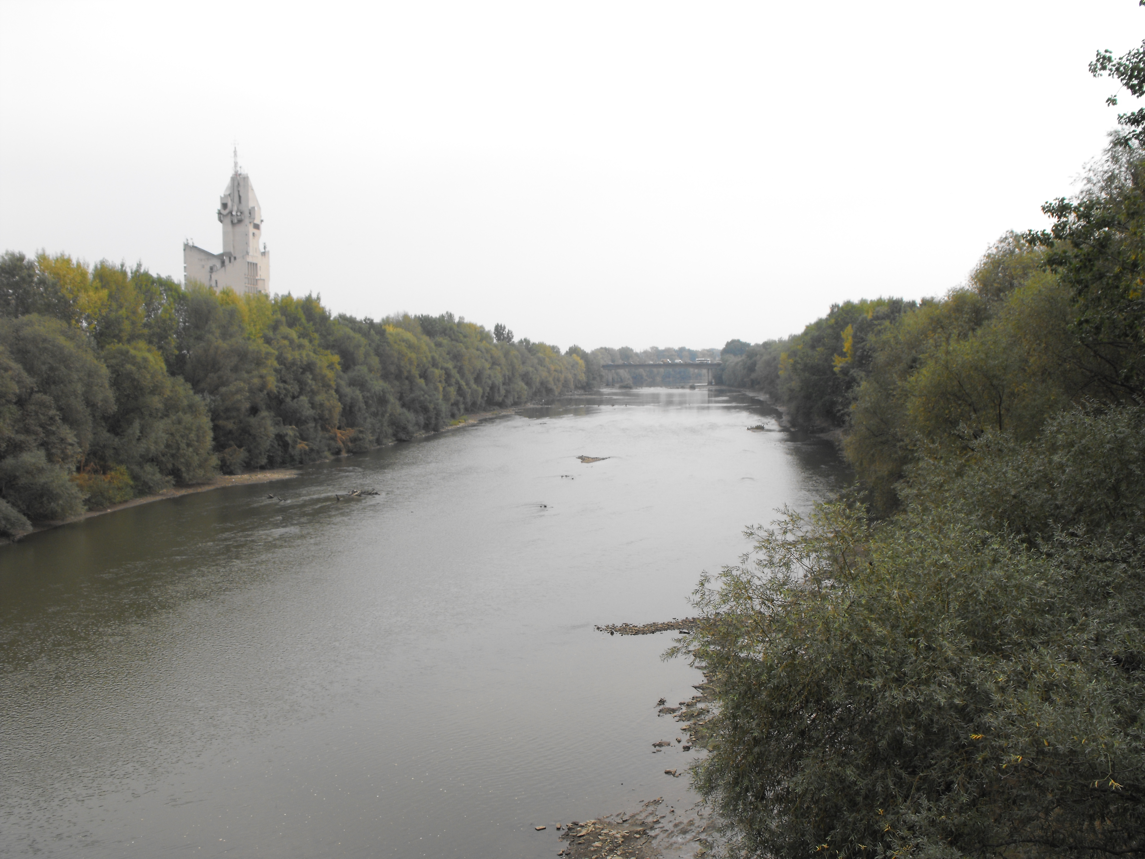 Szamos a hídról